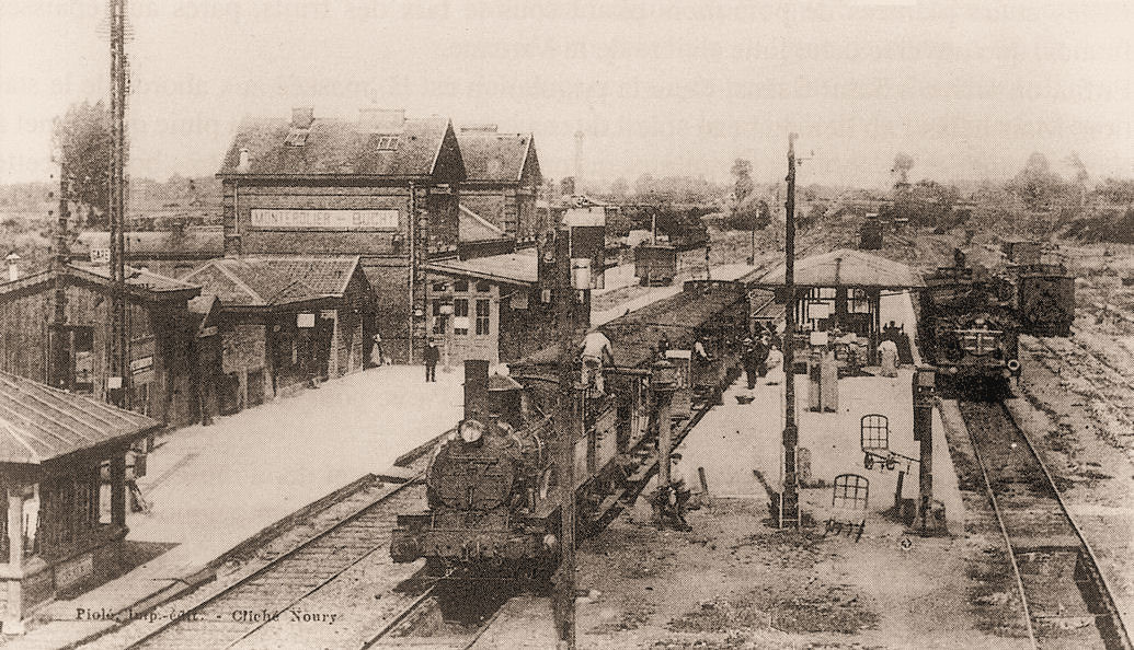 Carte postale ancienne éditée par Noury Gare de Montérolier-Buchy sur la ligne Amiens-Rouen